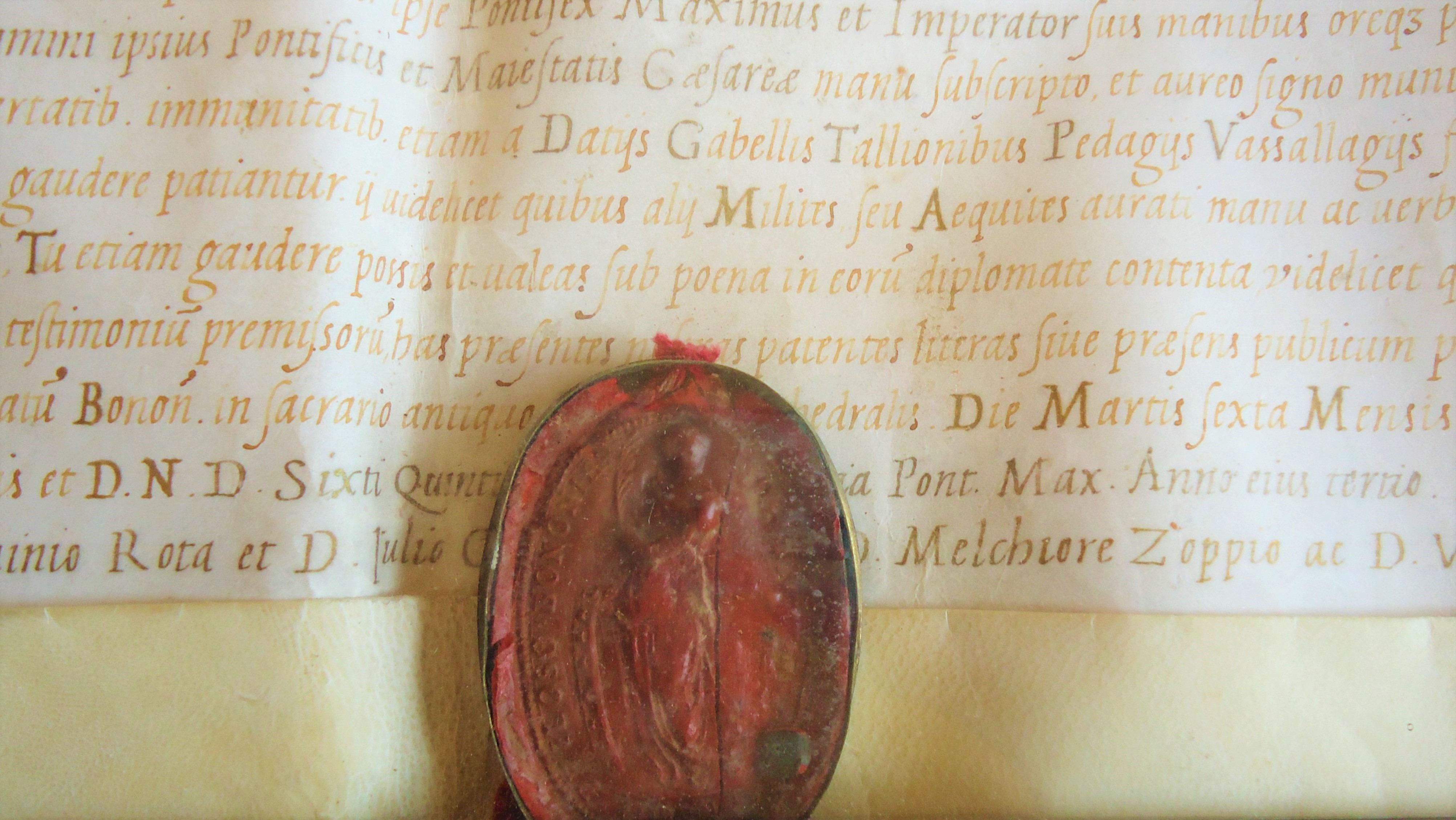 Diploma di laurea in medicina e filosofia - in oro su pergamena, con miniature e sigillo ceralacca con Santa Caterina d'Alessandria - rilasciato dall'Università di Bologna a Lelio Vincenti nel 1587. Datazione ulteriore: terzo anno del pontificato di Sisto V.